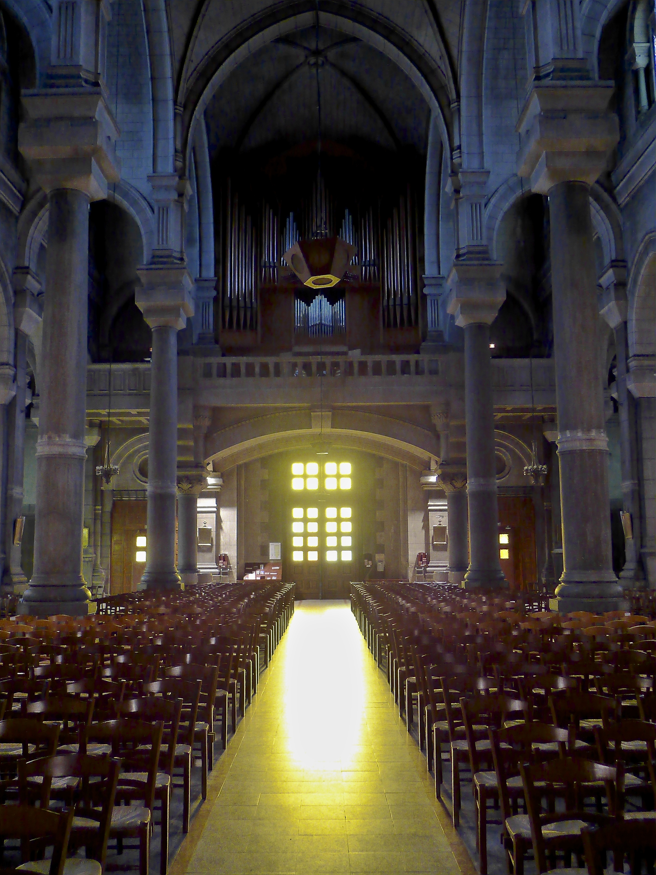 Vue de la nef et de l'orgue de la cathédrale Saint-Charles Borromée, située Place Jean Jaurès à Saint-Etienne.